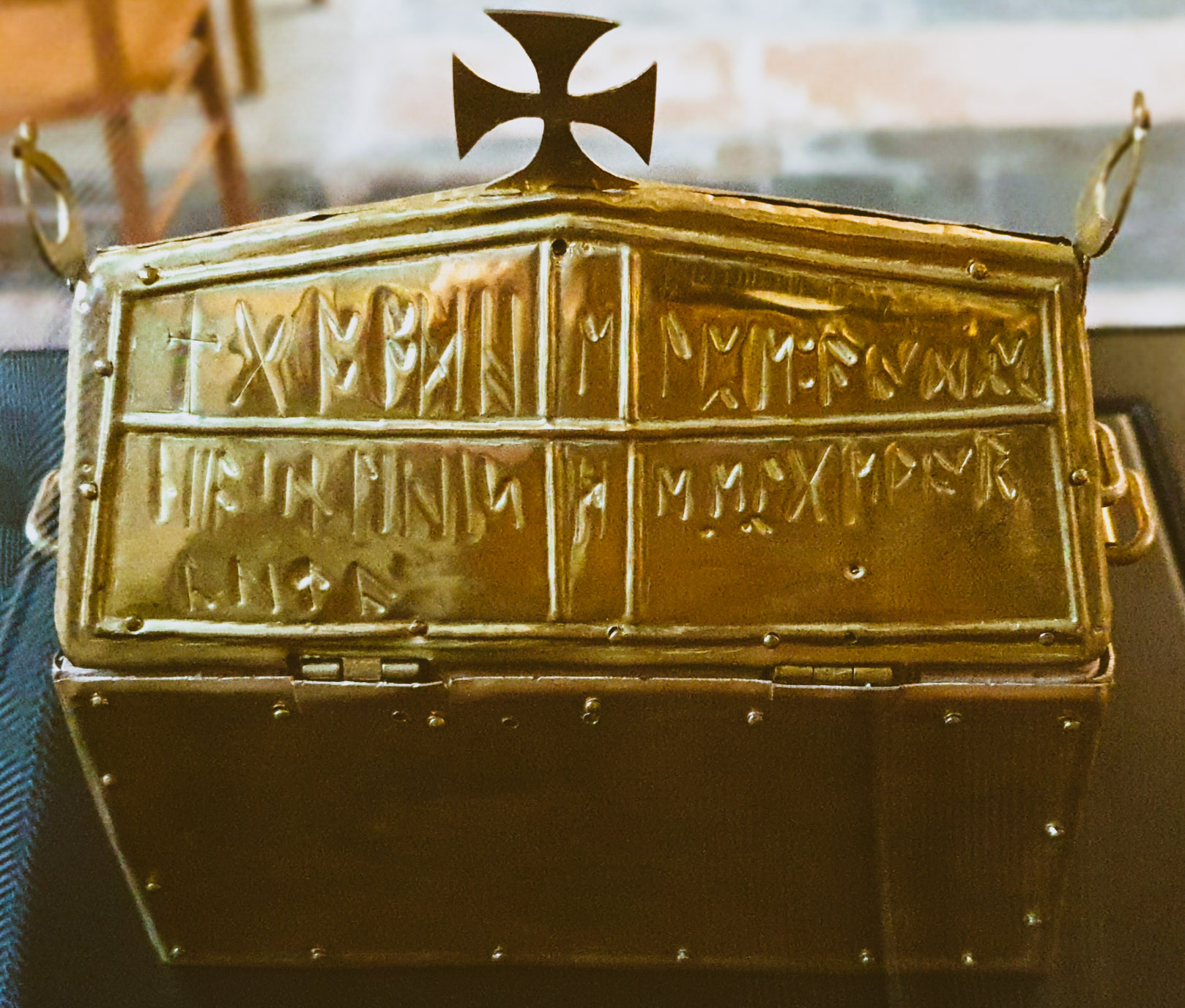 Chrismale de la collégiale Saint-Évroult de Mortain. Inscription runique. Reproduction exposée dans la nef de l'église.